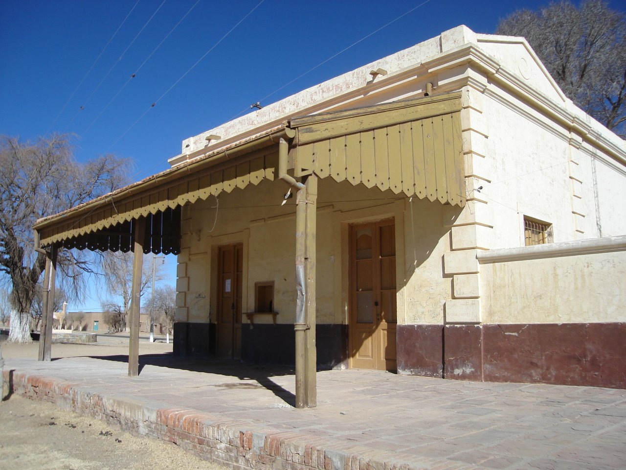 Edificio de la estación Pumahuasi del Ferrocarril General Manuel Belgrano de la red ferroviaria argentina, entre Puesto del Marqués y La Quiaca. Departamento Yavi, provincia de Jujuy.